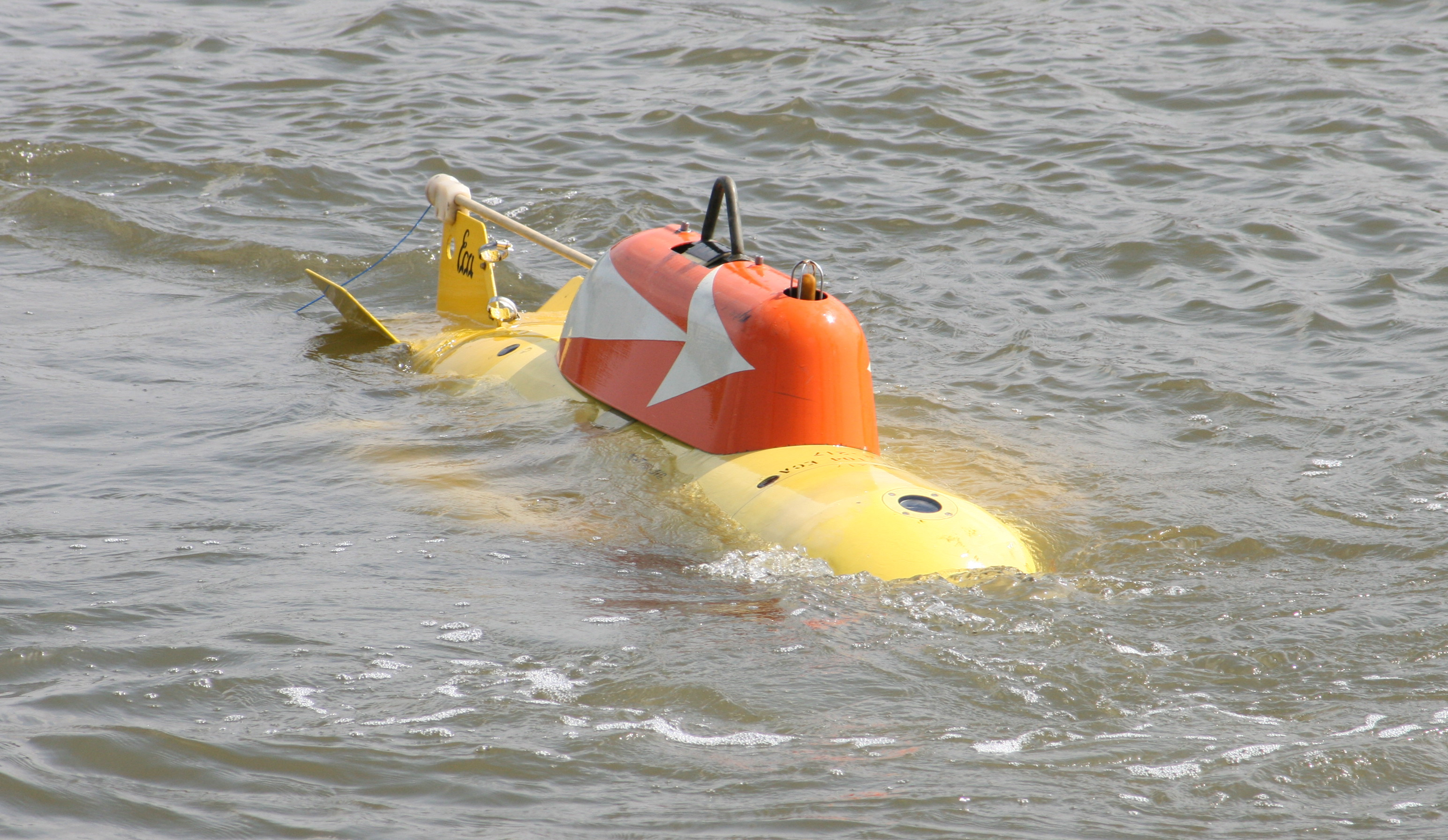 Poisson Auto Propulsé (P.A.P.). Est employé pour la chasse aux mines sous-marines. Ce petit sous-marin filoguidé les identifie et les détruit. Démonstration sur le Canal maritime Bruxelles-Escaut